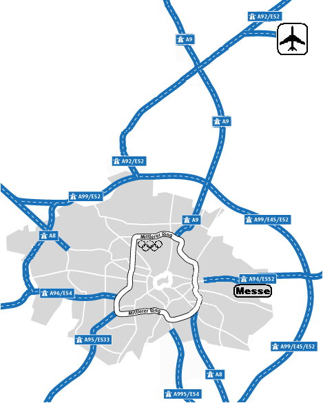 Skizze Münchner Mittlerer Ring mit Autobahnen. und POI (Flughafen, Messe, Olympiagelände). von Dick Tracy selbst verändert